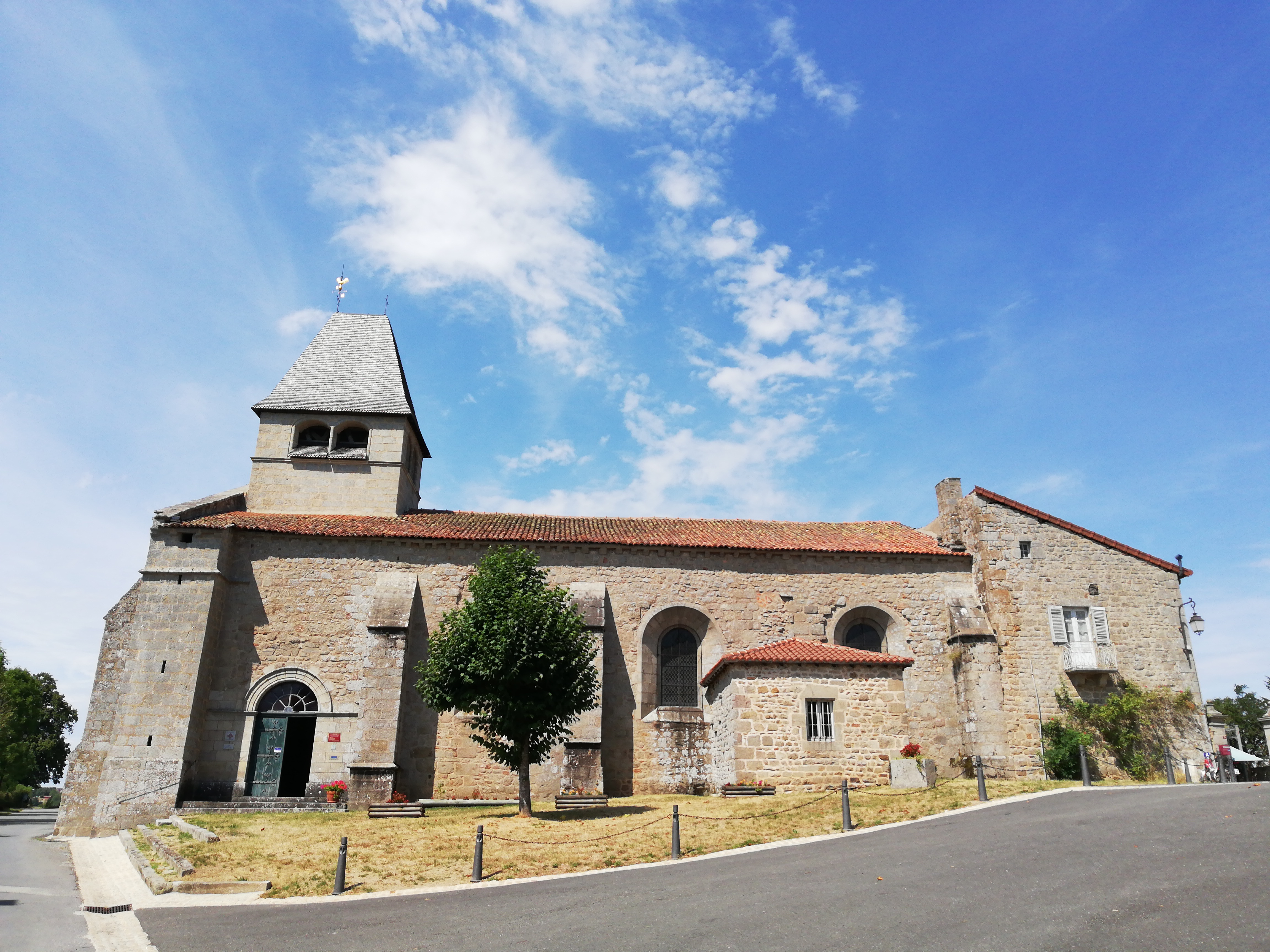 église (XIIIe siècle) de Saint-Sylvain-Bellegarde (23190)